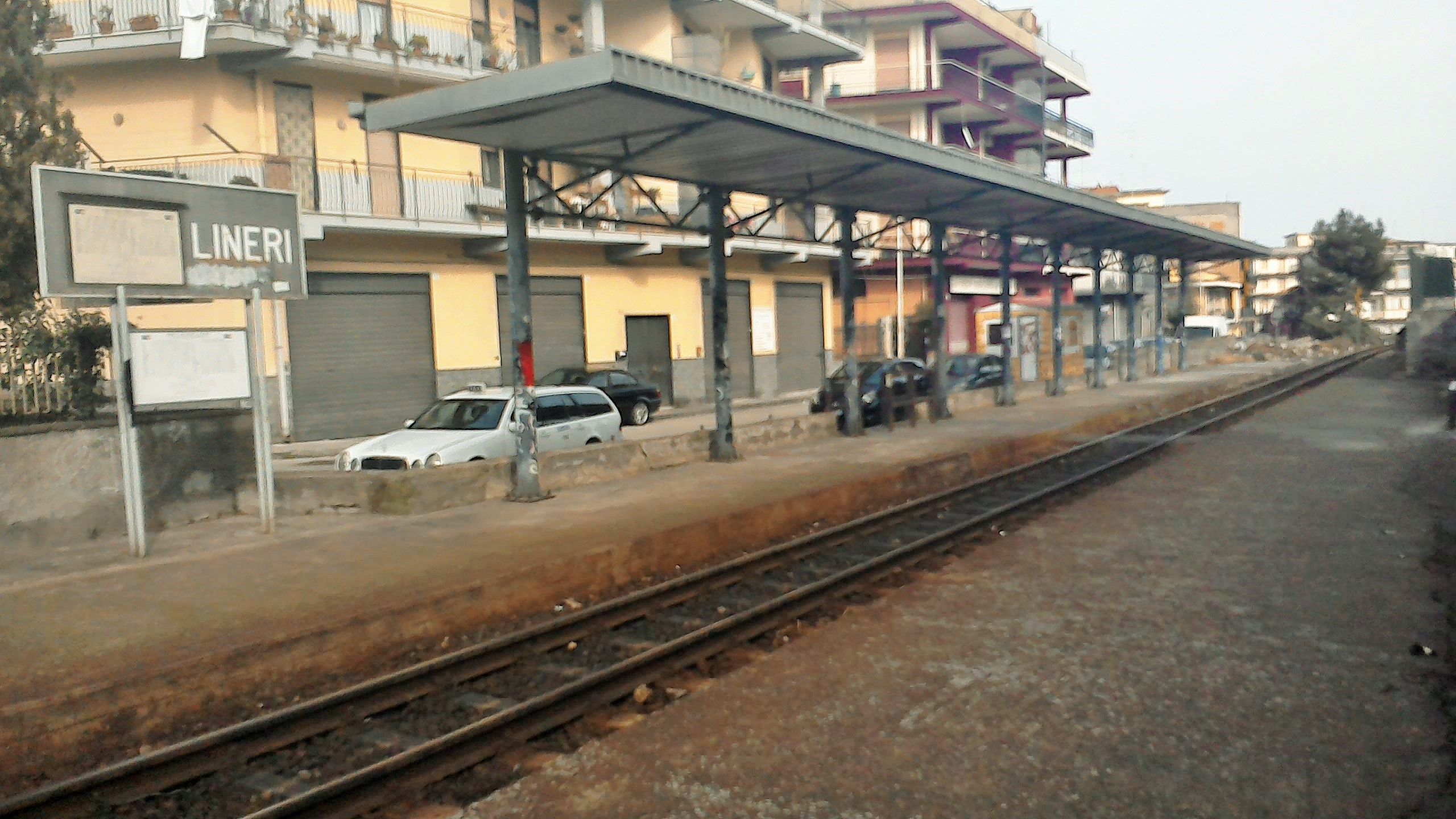 Fermata di Lineri della linea "Catania-Riposto" della Ferrovia Circumetnea.